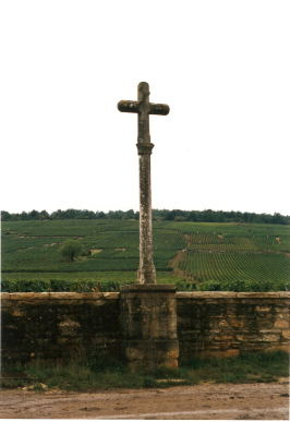 Vinhedos/Wineyards da Domaine Romanée-Conti - Bourgogne - France